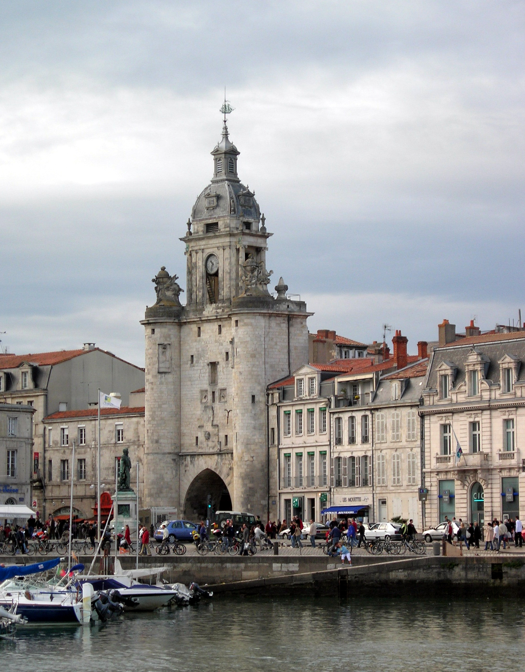 Description = Vieux-port de la Rochelle Source =Photo taken by Remi Jouan Date =Novembre 2005 Author =Remi Jouan